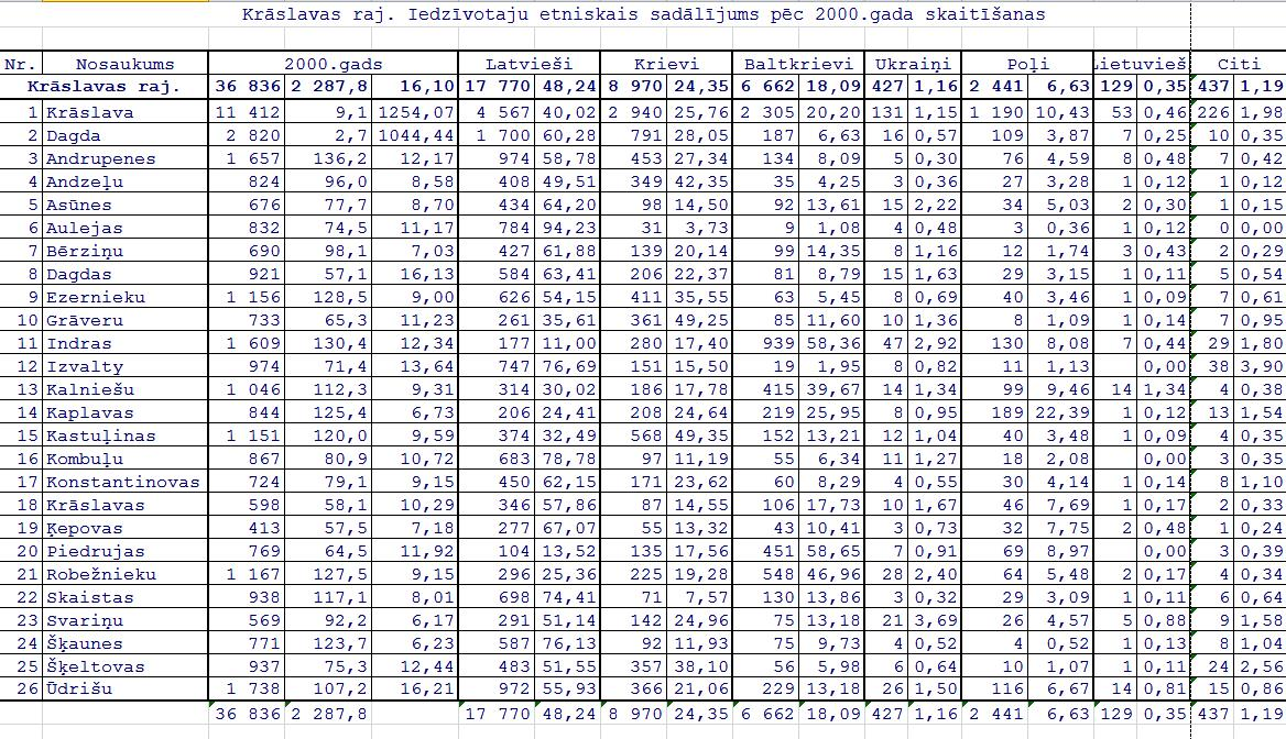 результаты переписи населения Латвии ни 01.04.2000